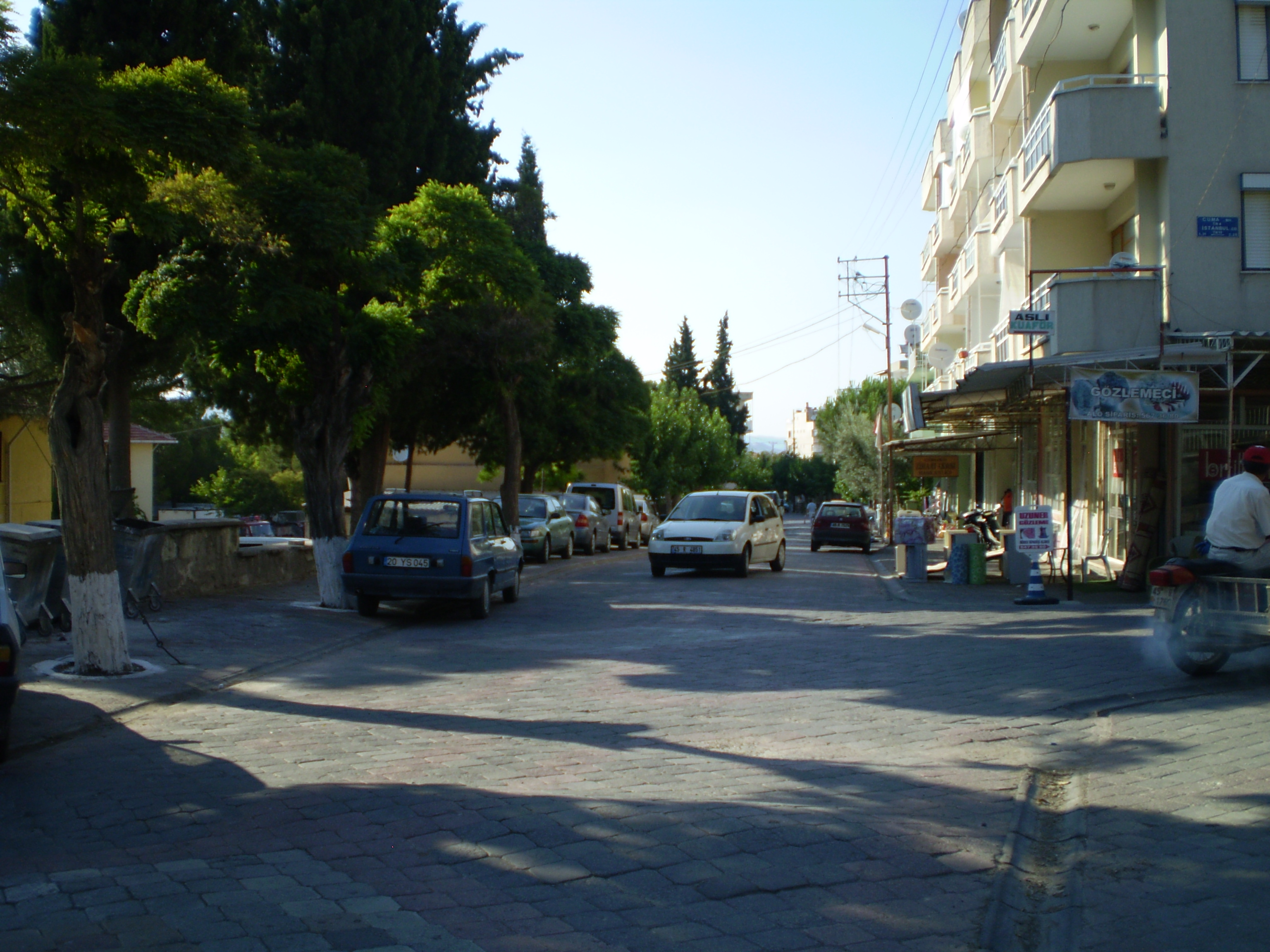 Gördes Cadde